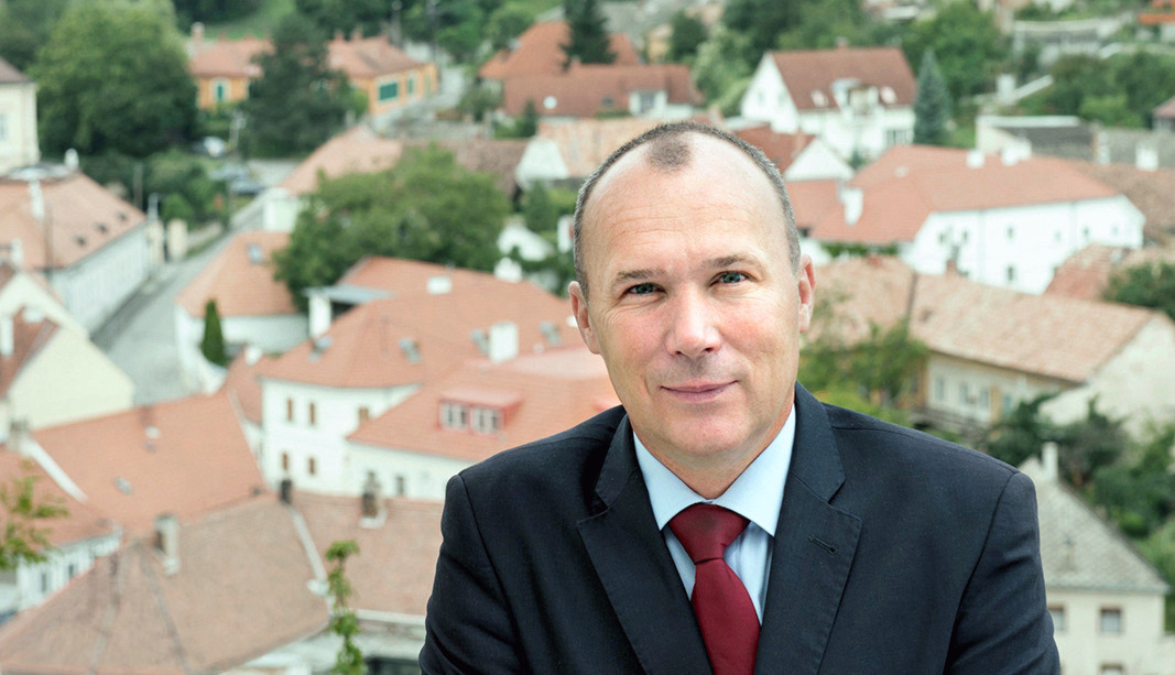 politikus, Veszprém polgármestere, korábban alpolgármestere, a humán ügyek felelőse